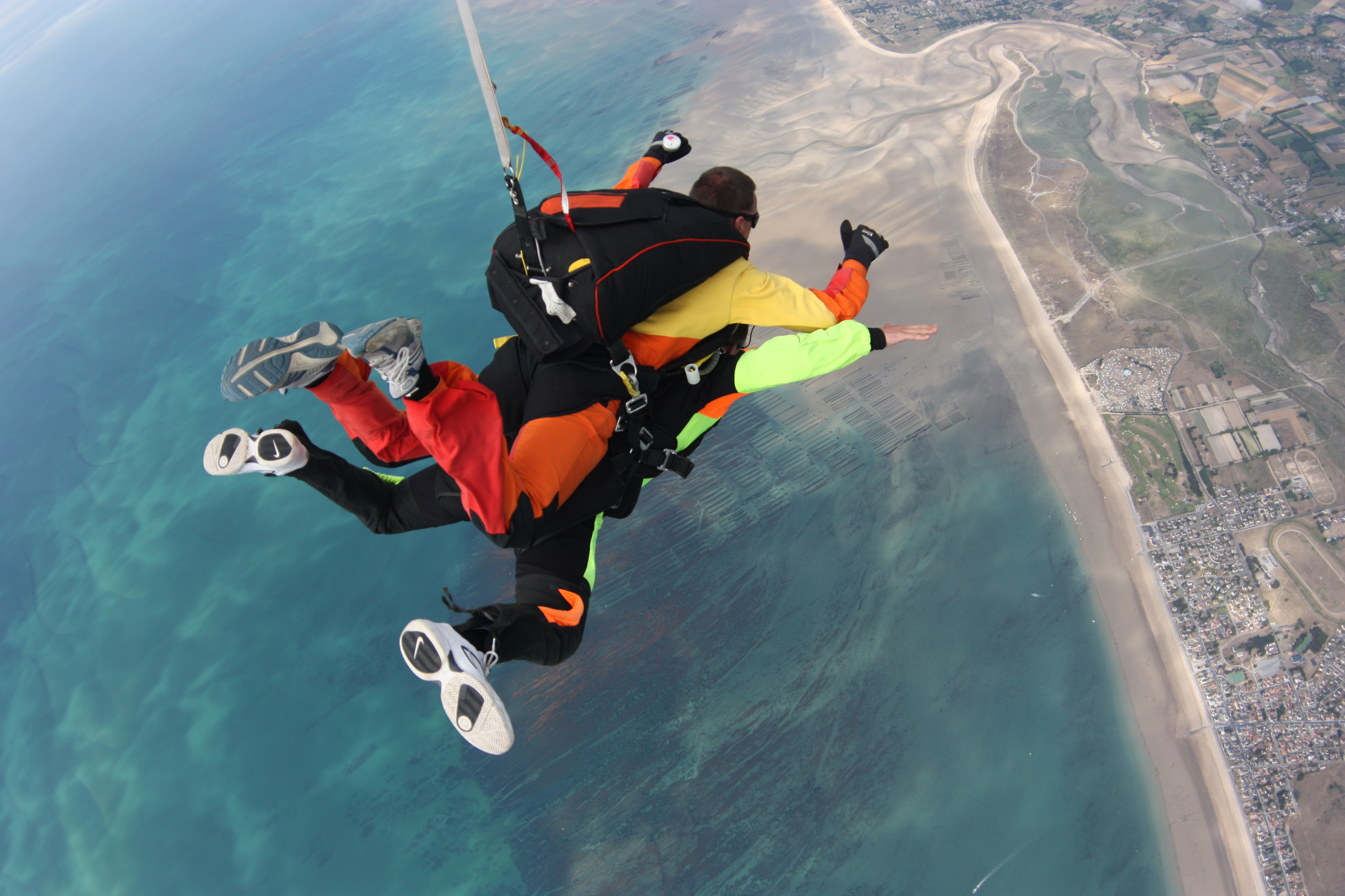 Chute libre vertical l'aérodrome de Bréville sur mer- Granville baie du mont saint-Michel avec Aair parachutisme : Tel 0698860433